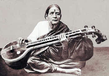 Veenai Dhanammal (1867–1938)